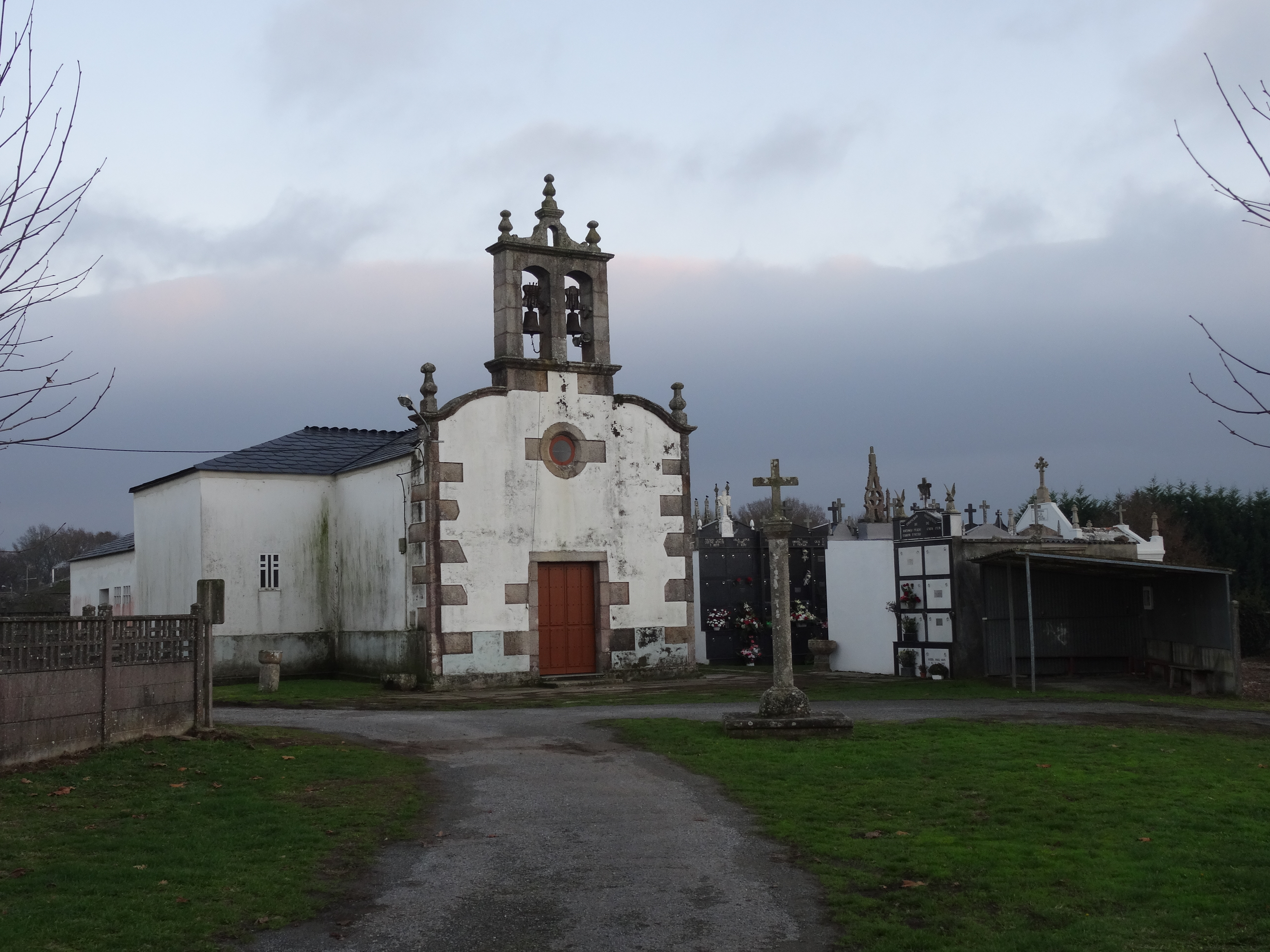 Ver título.